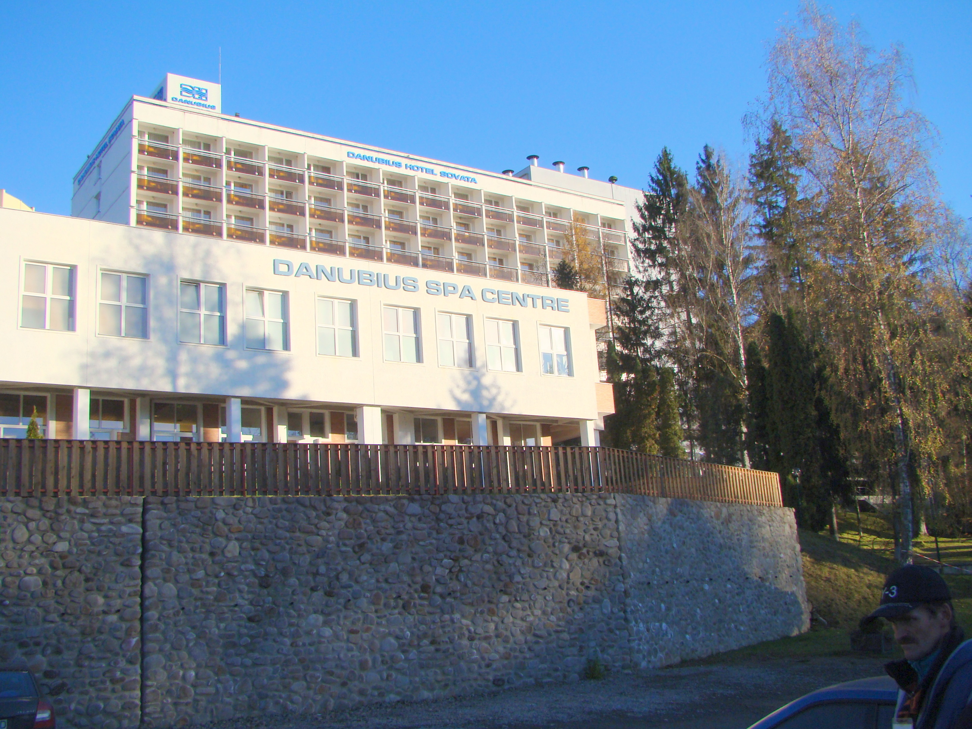 Danubius Hotel Sovata